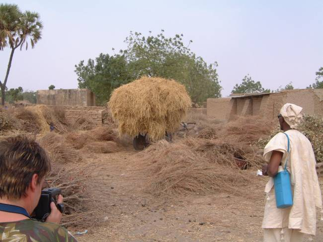 Photo de la préparation pour la cuisson des poteries. prise par Nerijp